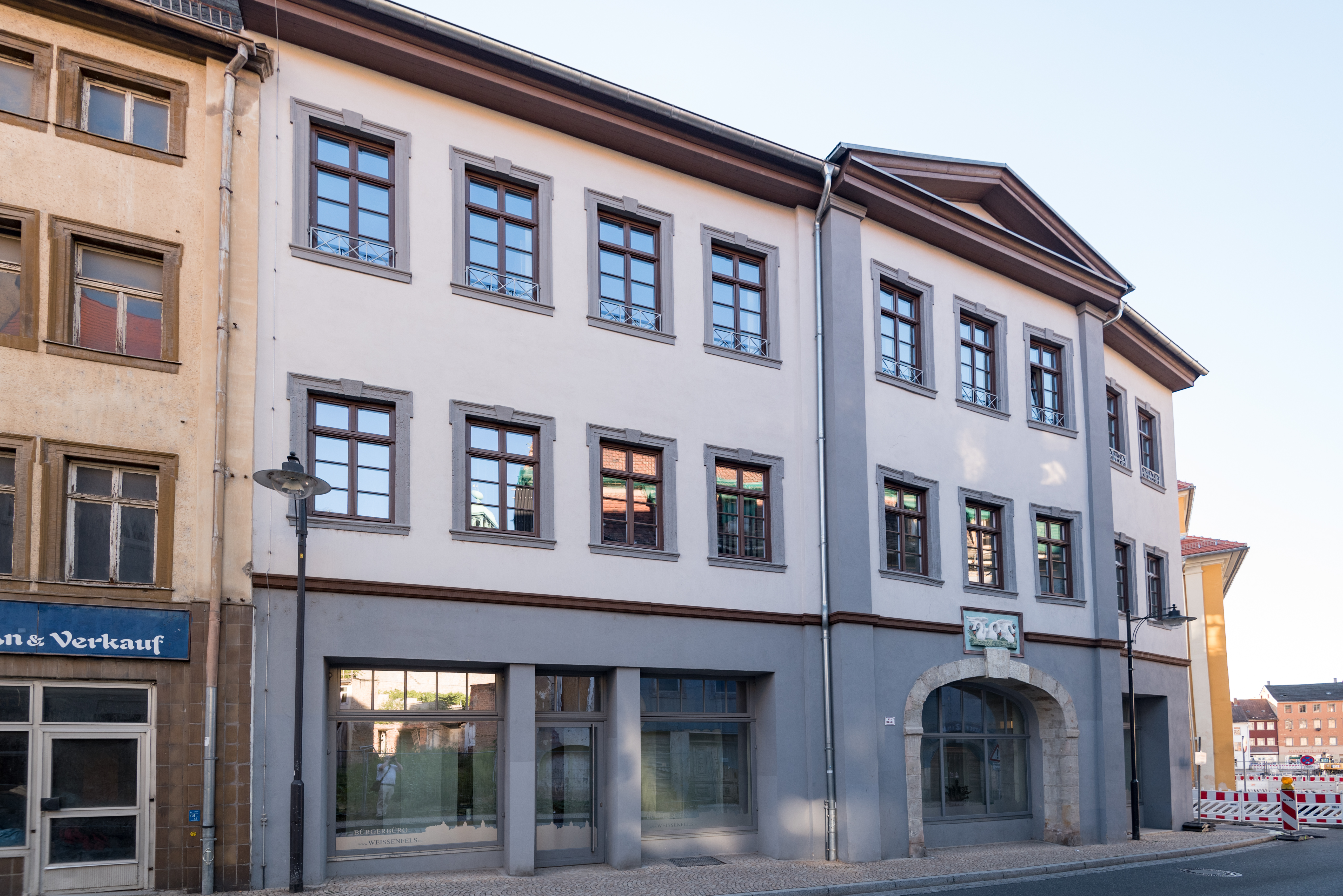 Weißenfels, Große Burgstraße 1